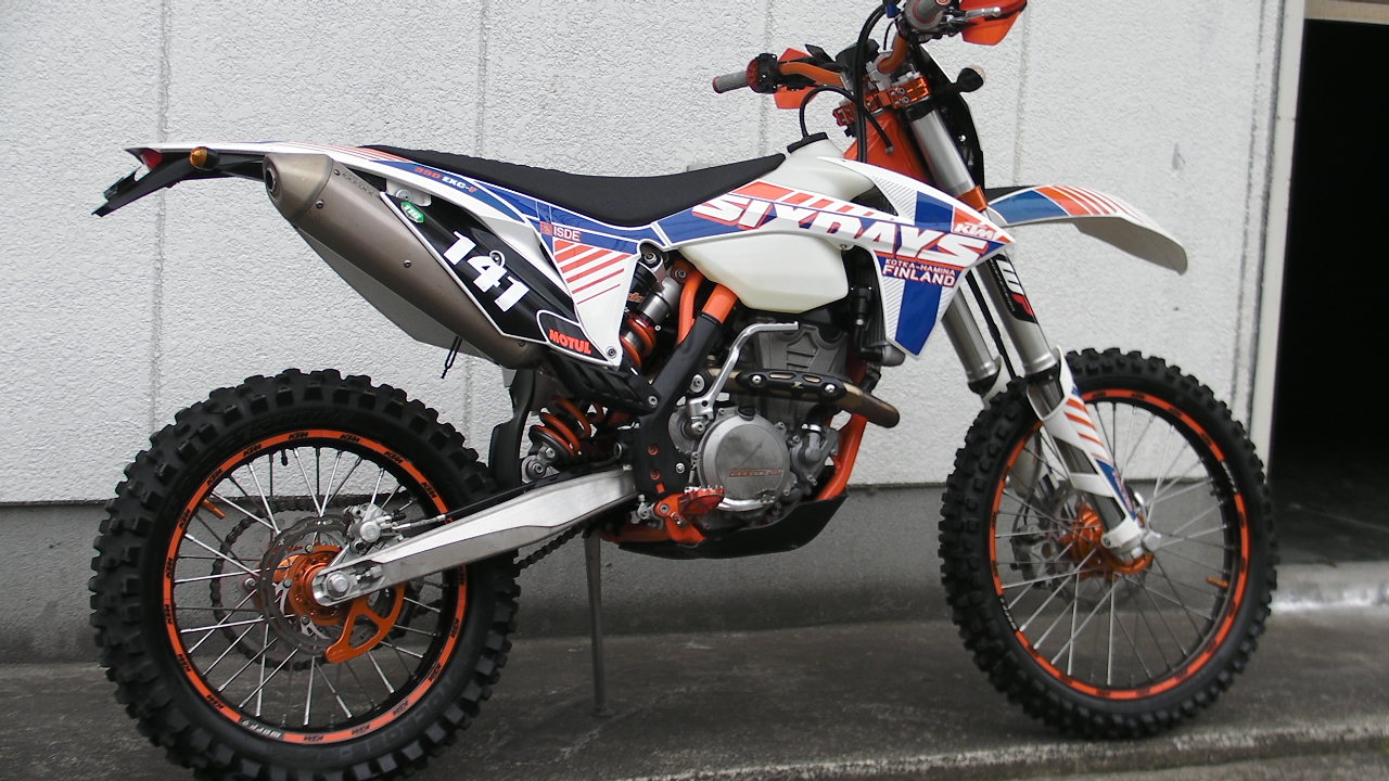 KTM 350 EXC-F SIXDAYS